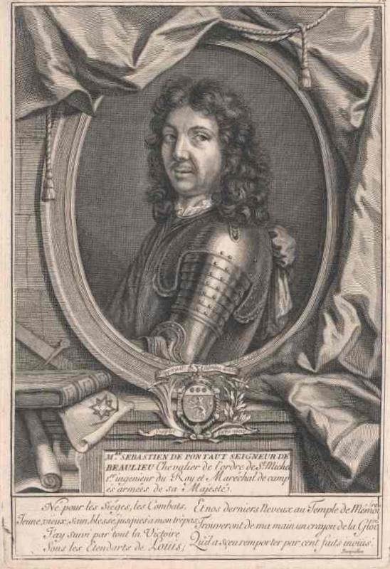 Portrait de Sébastien de Pontault, Seigneur de Beaulieu (1612-1674)